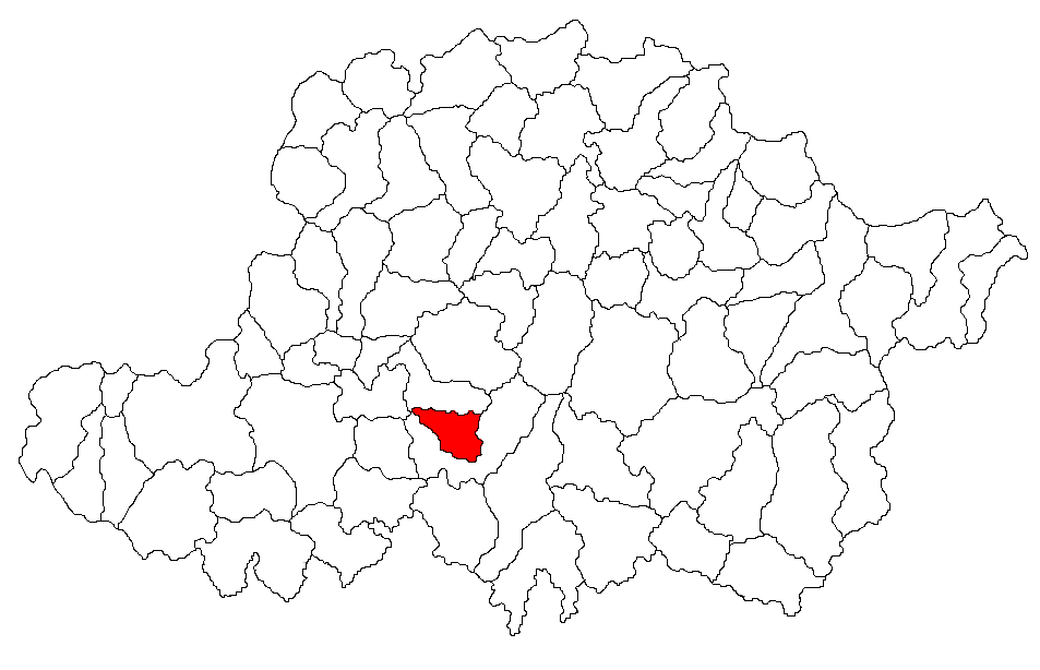 Categorie:Hărţi ale judeţului Arad